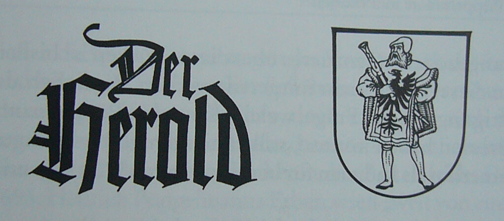 Verein für Heraldik, Genealogie und verwandte Wissenschaften zu Berlin - Schriftzug und Logo